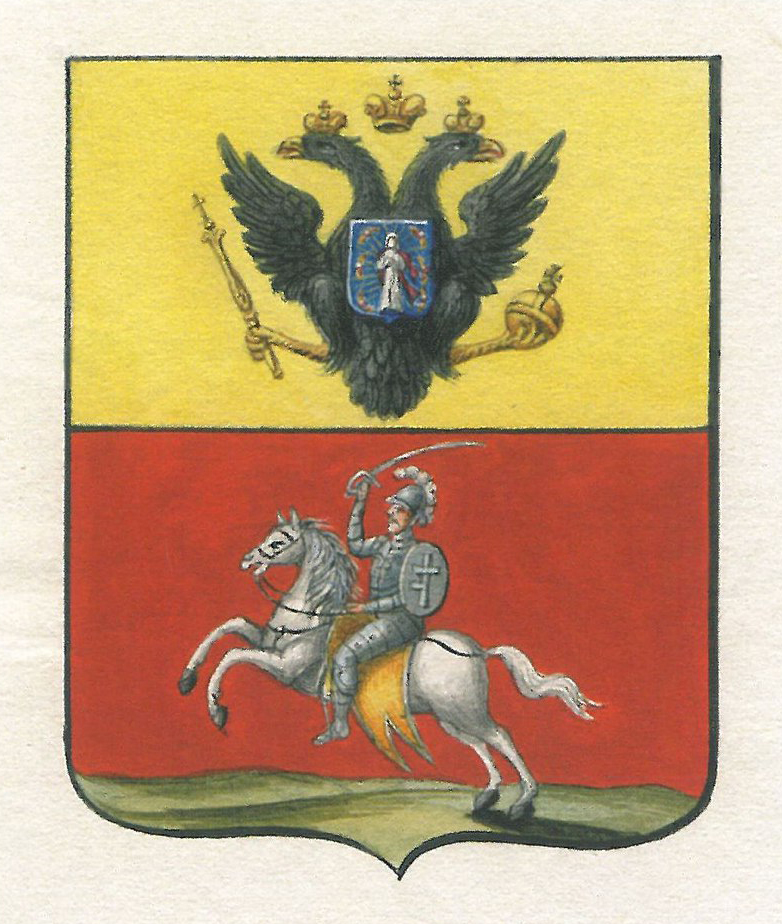 Беларуская (тарашкевіца): Герб Слуцкага павету (Słucak) з Пагоняй (Pahonia)